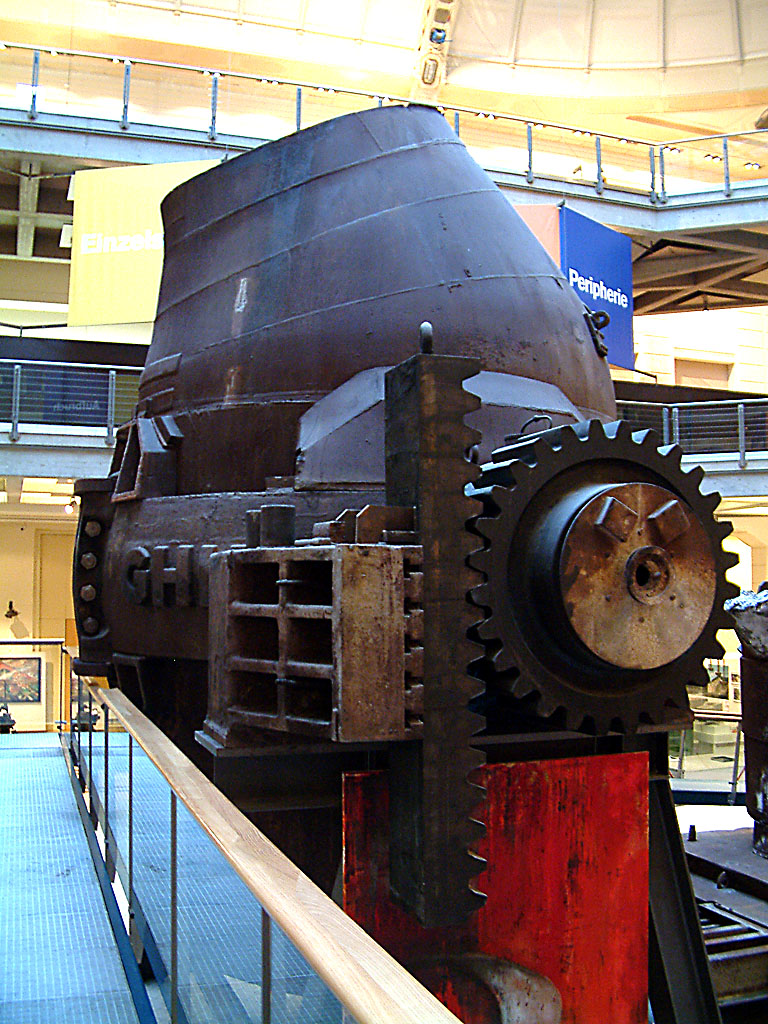 Einer der ersten kommerziell eingesetzten LD-Tiegel von 1952 aus dem VOEST-Werk Linz, heute im Technischen Museum Wien. Der Tiegel wiegt 120 Tonnen, wurde von der deutschen Gutehoffnungshütte (GHH) gefertigt, nach Ende seiner Nutzung 1977 in Linz abgebaut und im Technischen Museum Wien zur Präsentation wieder aufgebaut.